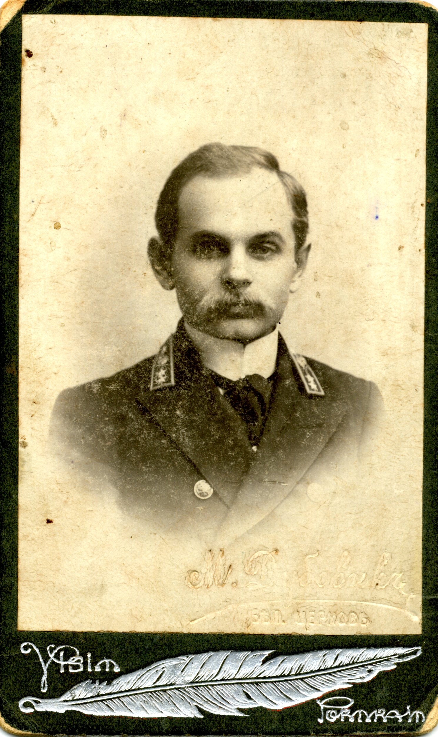 Кирило Стеценко в учительській формі, 1908/9. ЦДАМЛМ України, ф. 175, оп. 1, од.зб. 43, арк. 1